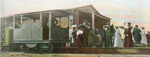 Bahnhof Juist mit Inselbahnwagen, ca. 1902